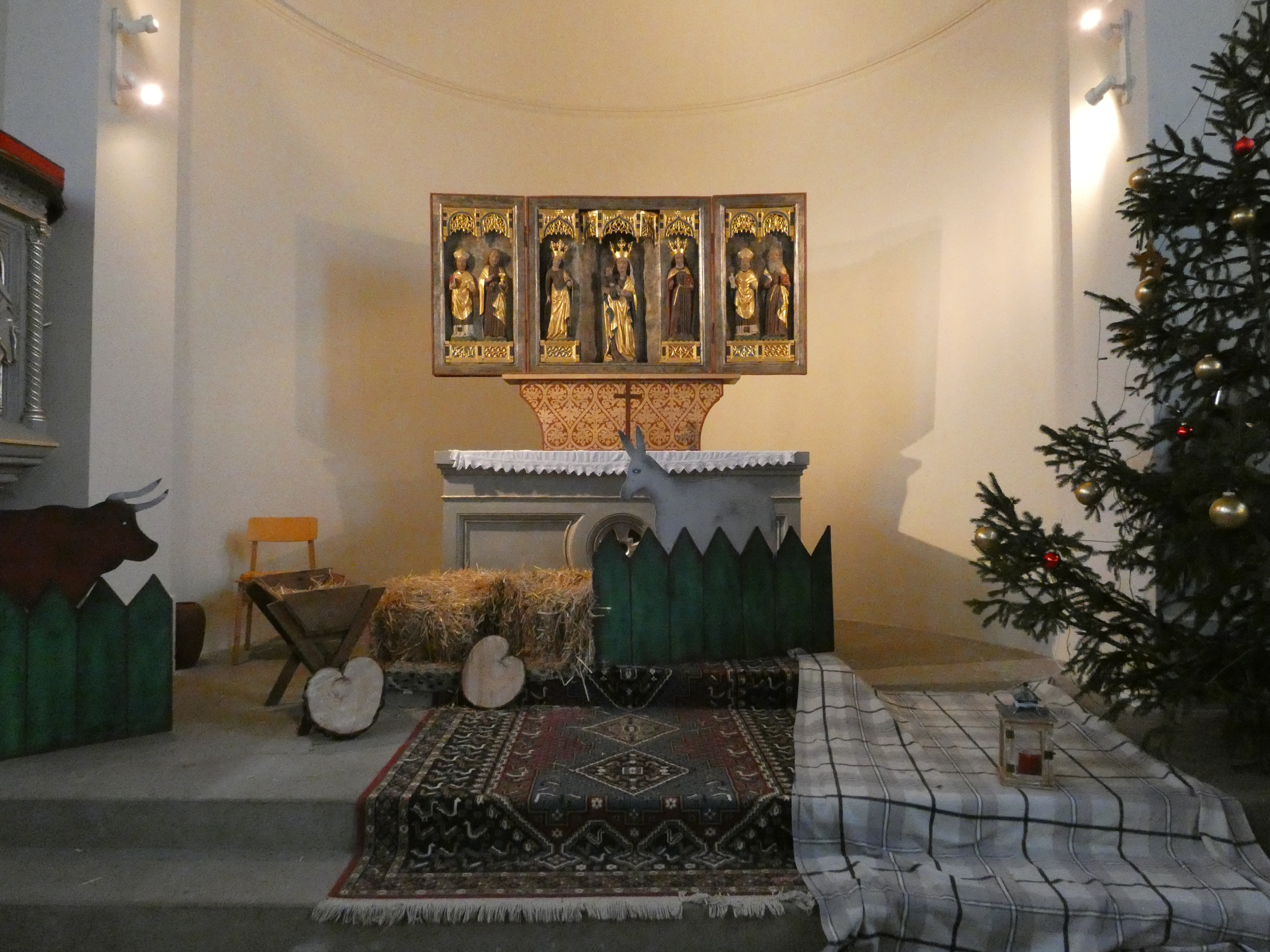 Marienaltar Dorfkirche Klein Kreutz